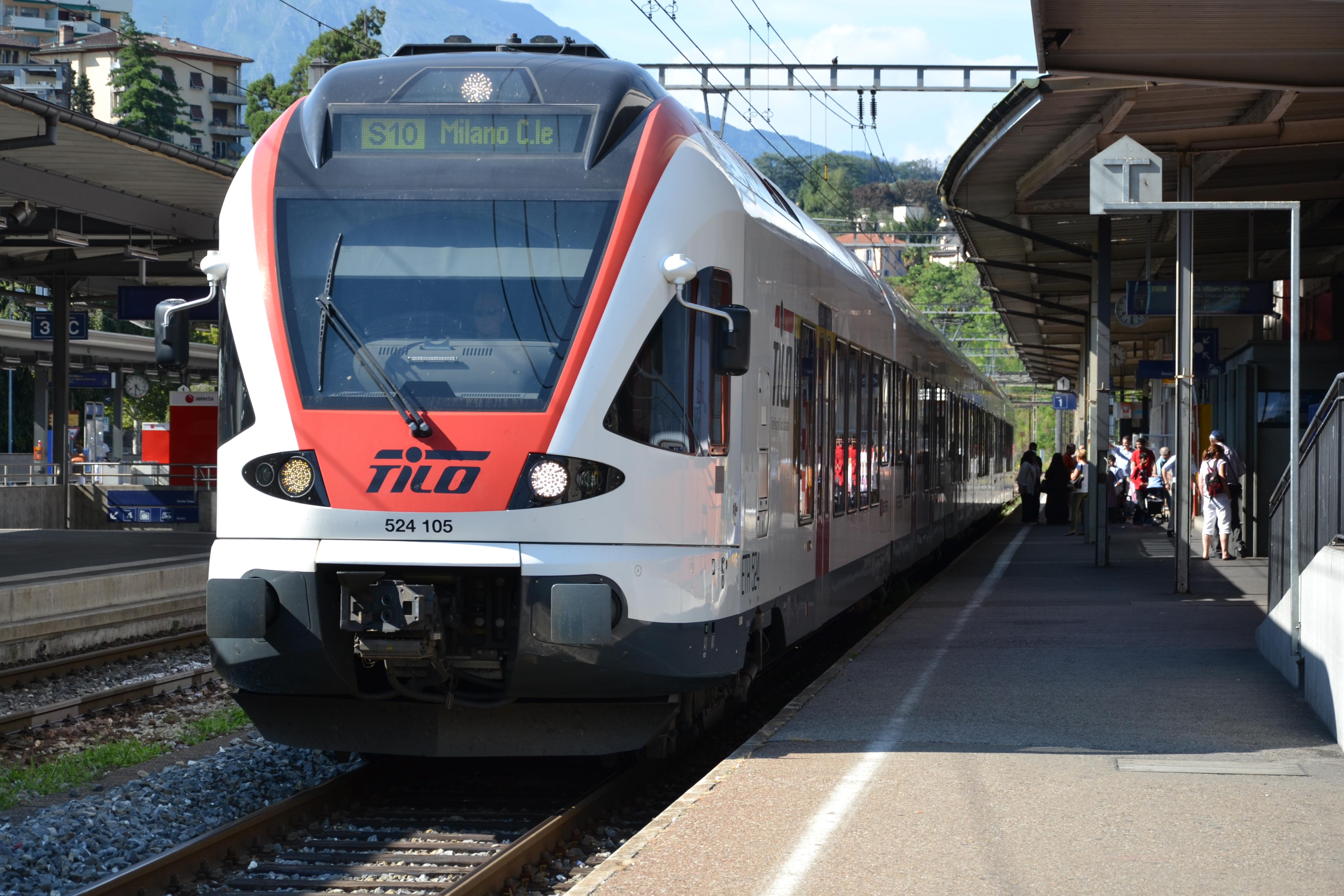 TILO (Treni Regionali Ticino Lombardia) is een samenwerkingsverband tussen de SBB en het Italiaanse Trenord, dat de internationale stoptreindiensten uitvoert tussen Ticino en Italië. De belangrijkste dienst van TILO is de S10-dienst tussen Airolo, aan de zuidkant van de Gotthardtunnel en Albate-Camerlata, in noord-Italië. Enkele treinen van deze route rijden na Albate-Camerlata, dat niet eens zo ver van de grens ligt, verder door Italië in, richting Milaan. Hier een van de doorgaande treinen, gereden door treinstel 524 105, te Lugano.